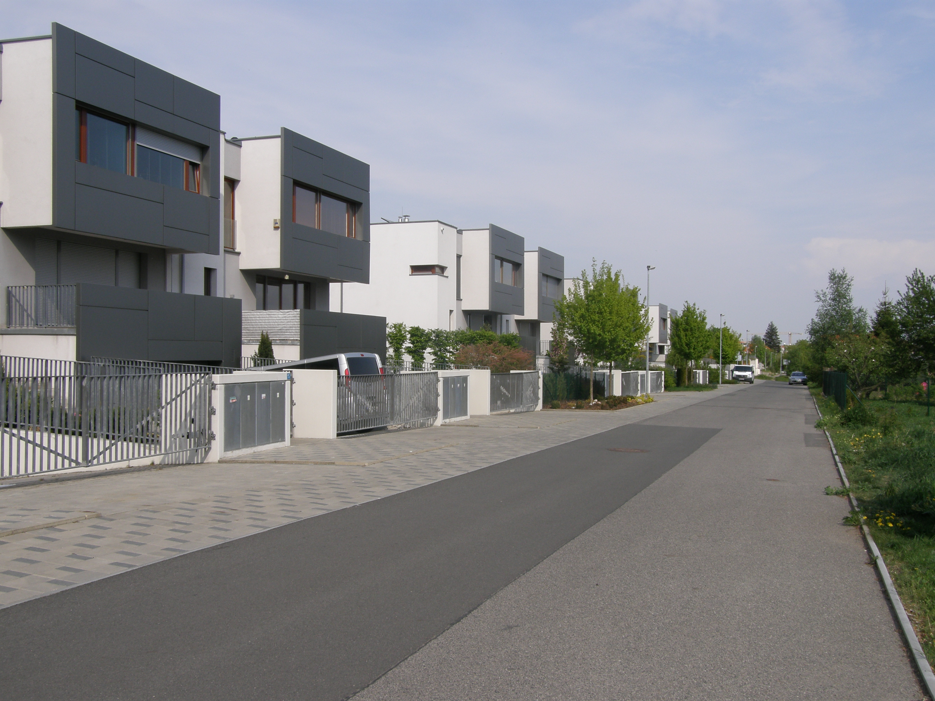 Praha-Jinonice, Schwarzenberská ulice, nová zástavba.